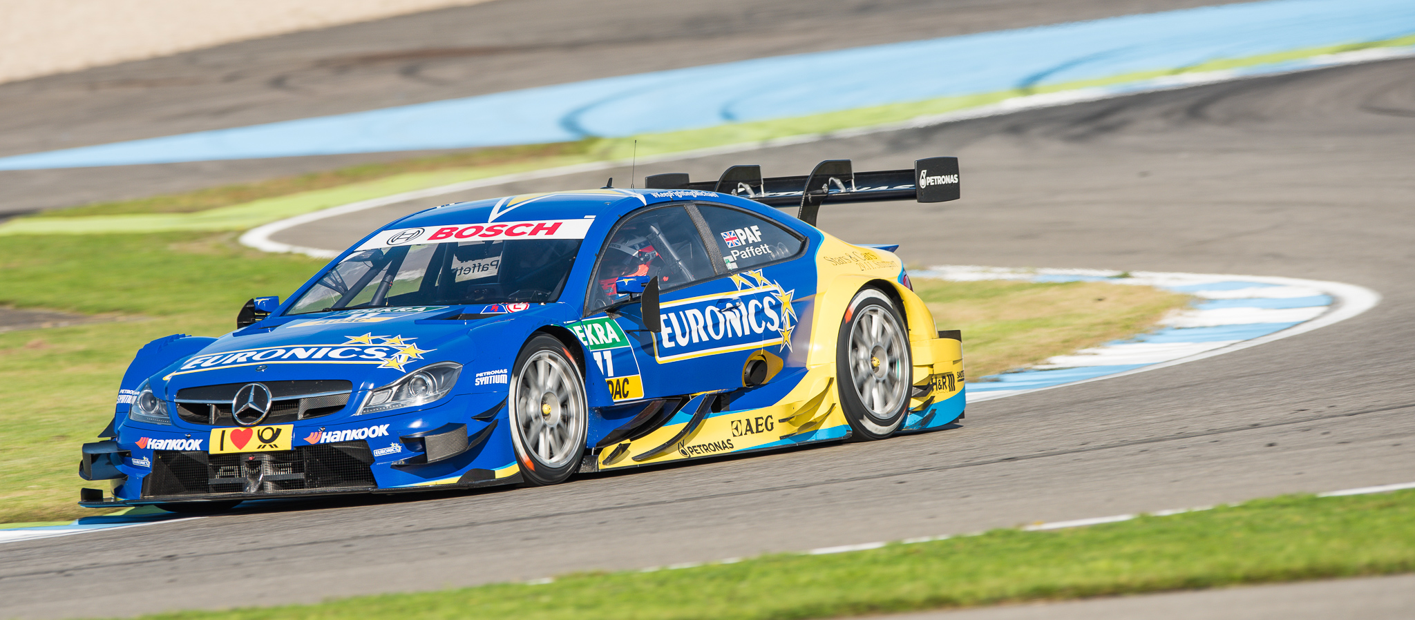 DTM,Deutsche Tourenwagen Masters,EURONICS Mercedes AMG C-Coupe,Gary Paffett,HWA AG,Hockenheimring,Motorsport